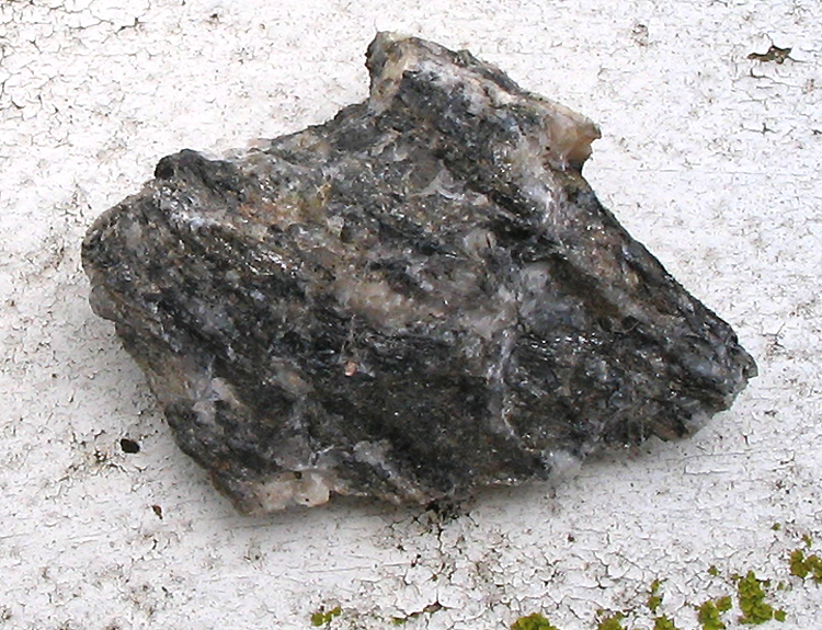 Mervent, Vendée, France: sur ce document vous voyez la roche dans son état original consultez le fichier du même nom - Orthogneiss de Mervent -mylonitisé - pour voir la différence après transformation